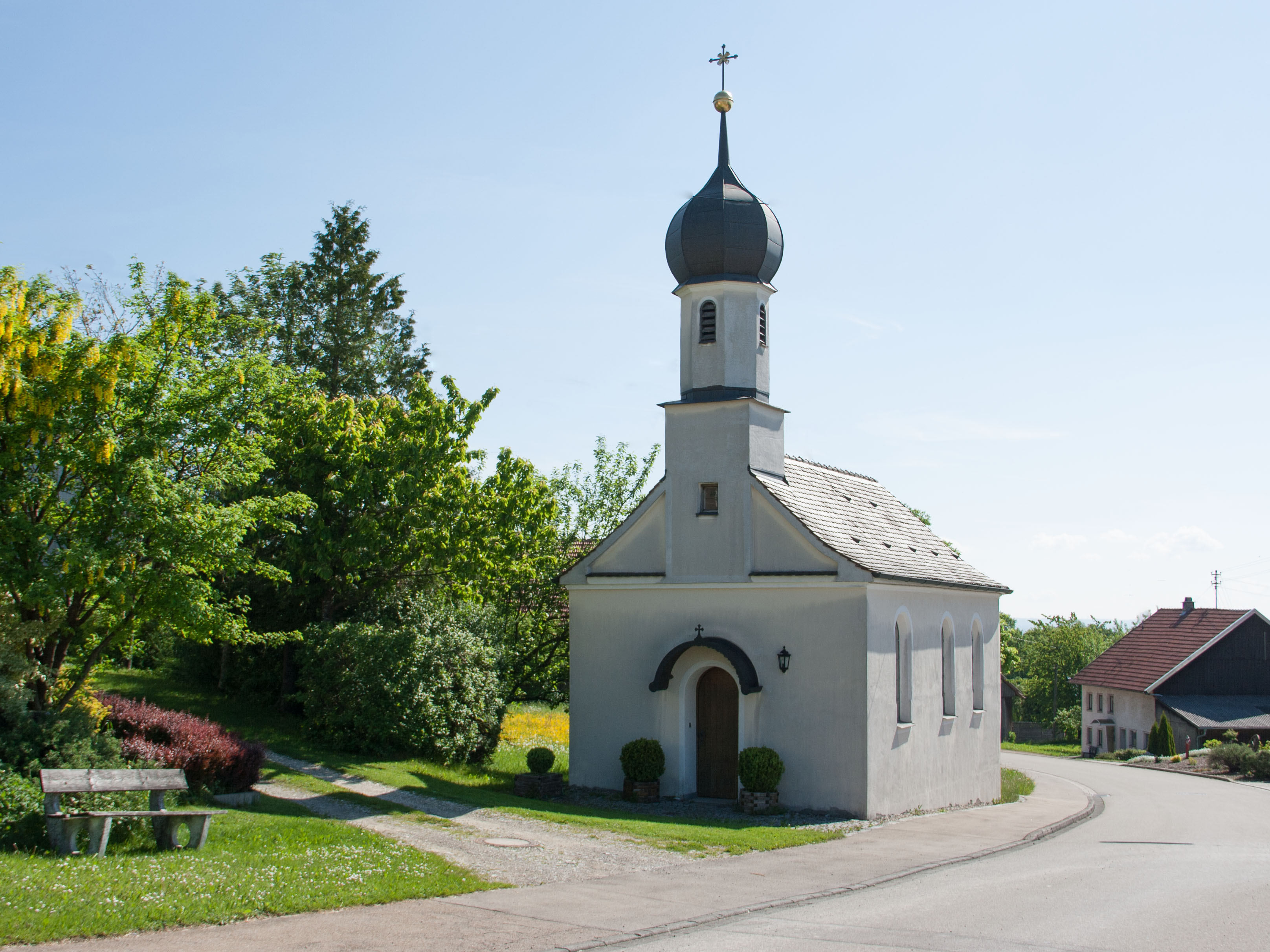 Ansicht der Kapelle aus Südwest